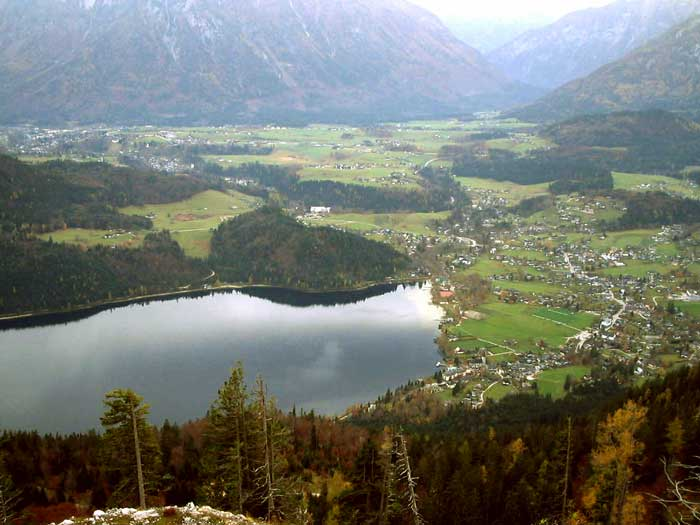 Loser: Blick auf Altaussee/Altausseer See